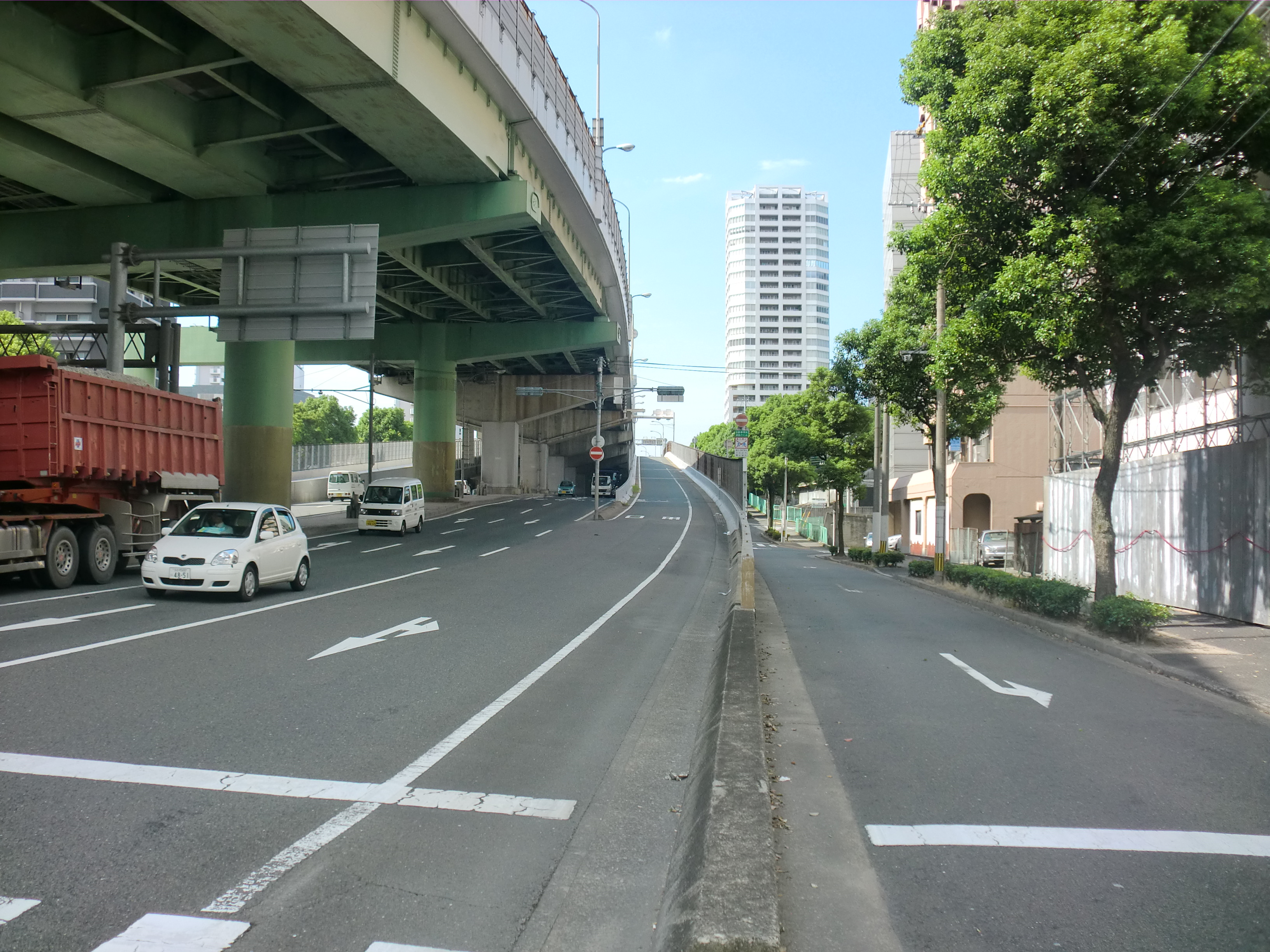 北九州都市高速道路1号線勝山（かつやま）ランプ（出口）